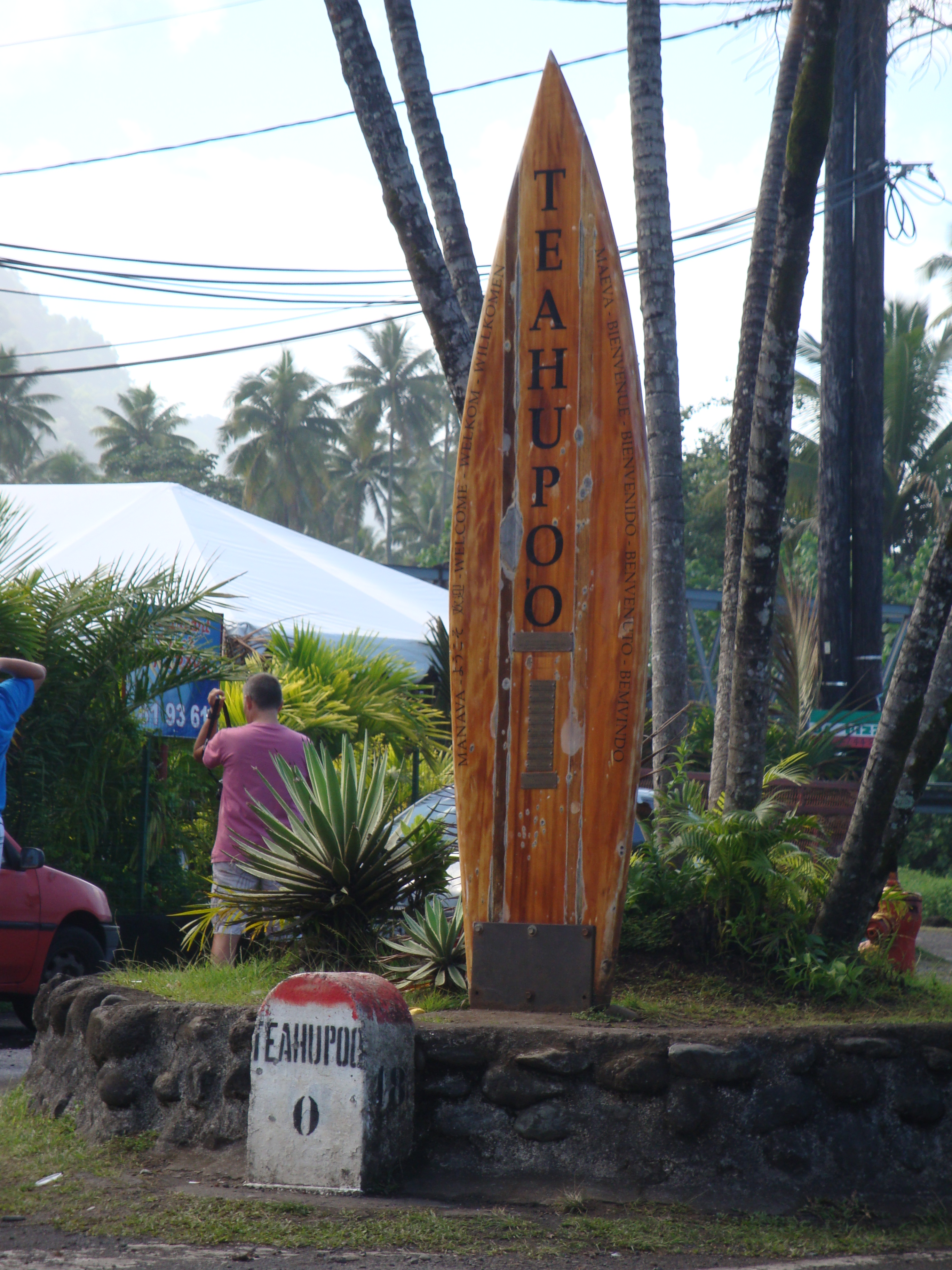 Arrivée à Teahupoo